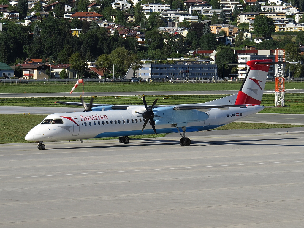 Eine Bombardier Dash 8 Q400 der Austrian auf dem Flughafen Innsbruck